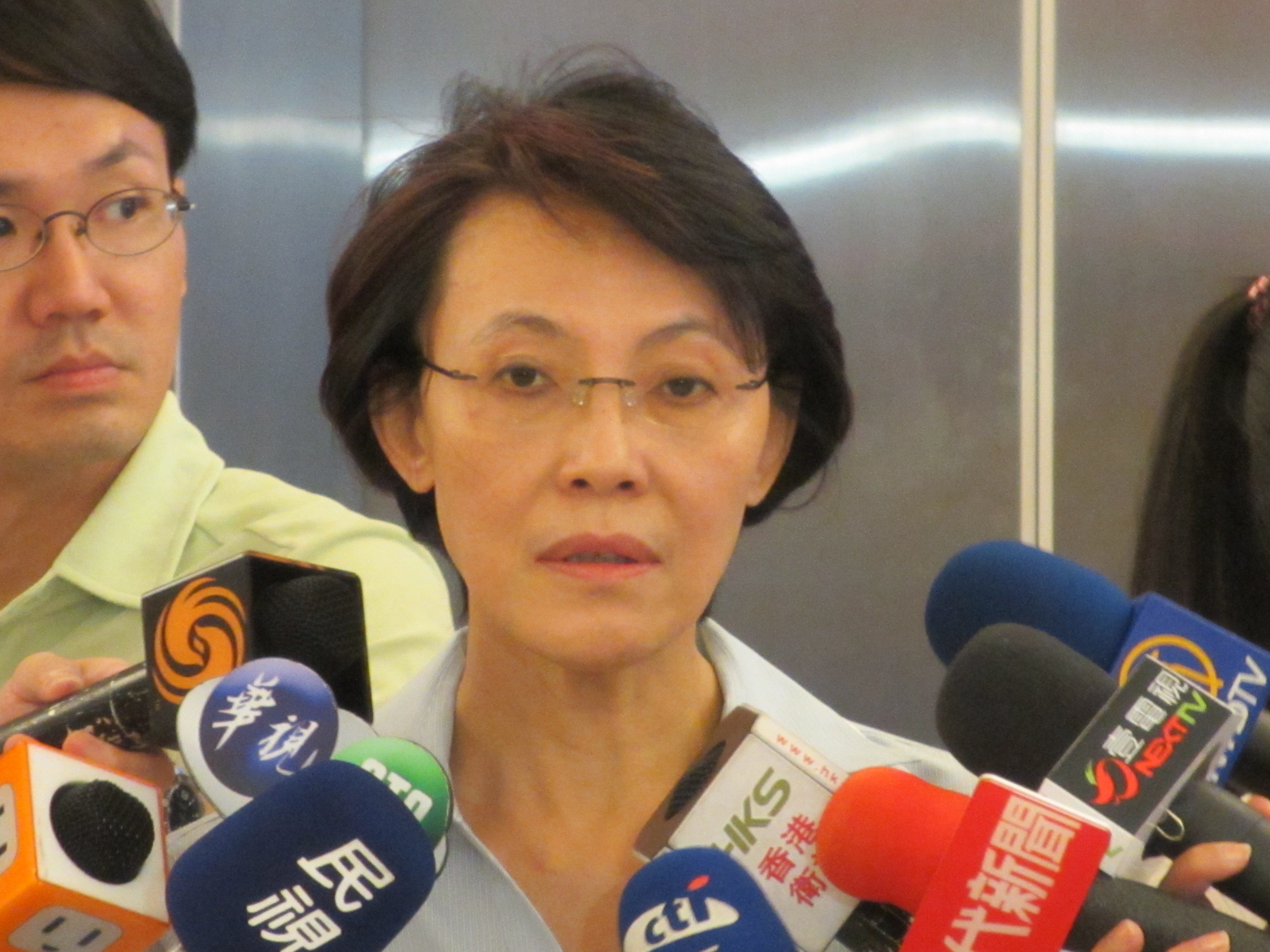 中國國民黨籍立法委員黃昭順。